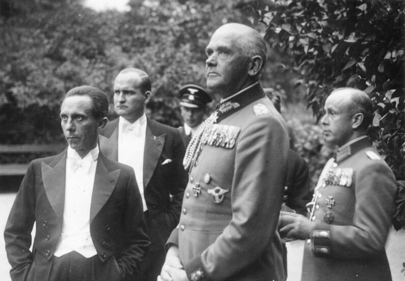 Beginn der Bayreuther Festspiele: UBz: Generalfeldmarschall von Blomberg und der Reichsminister Dr. Goebbels während der Pause. Foto: Was [-ke] 9545-37 [Scherl-Text] ADN-ZB/Archiv Faschistisches Deutschland 1933 - 1945 Beginn der Bayreuther Festspiele, Juli 1937 Während einer Pause (links) der faschistische Propagandaminister Goebbels und (Mitte) der faschistische Kriegsminister Generalfeldmarschall Werner von Blomberg. 9545-37 Aufnahme: Waske